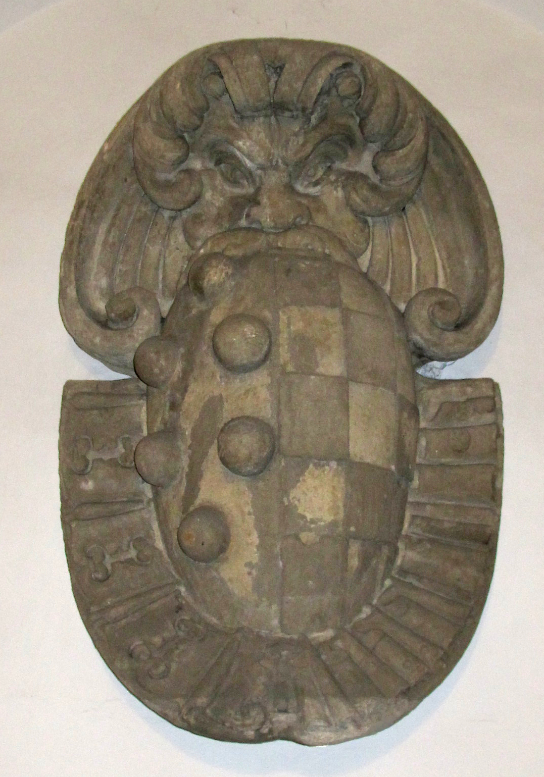 Palazzo di sforza almeni, androne, stemma medici-da toledo2